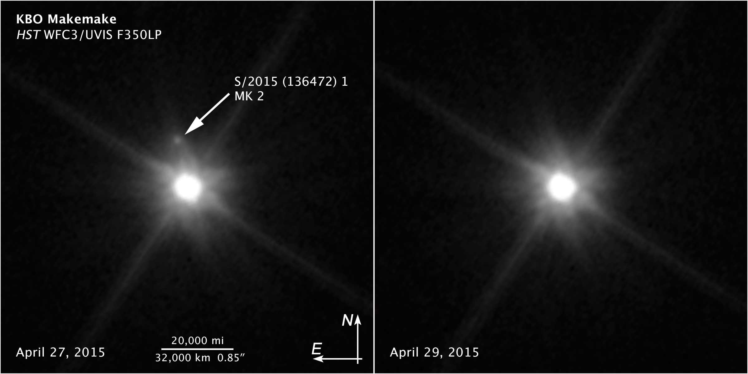 Photos de Makémaké et sa lune prise par Hubble.